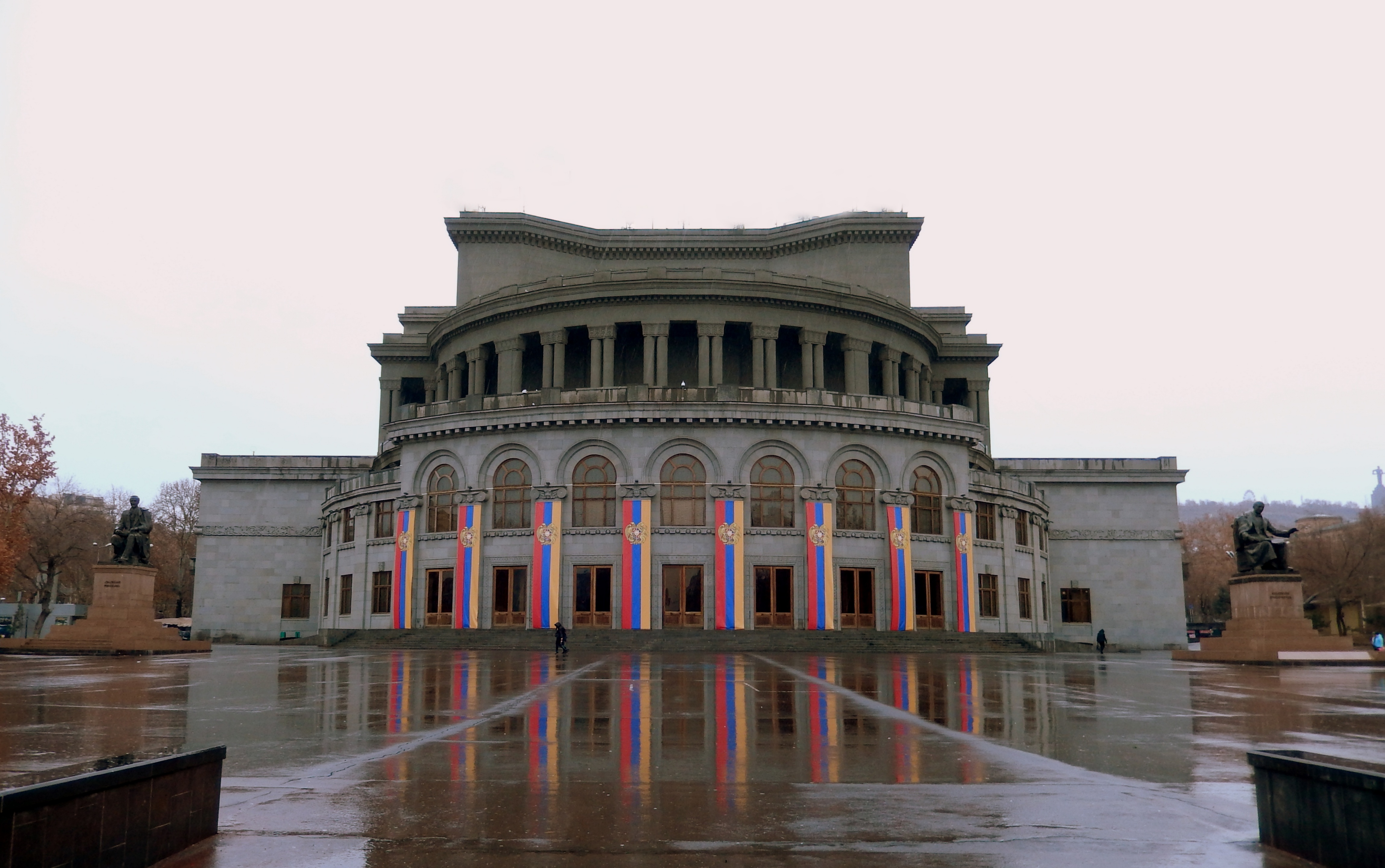 Հանդիսատեսային շենք. Ալեքսանդր Սպենդիարյանի անվան օպերայի և բալետի ազգային ակադեմիական թատրոն 6/95.2